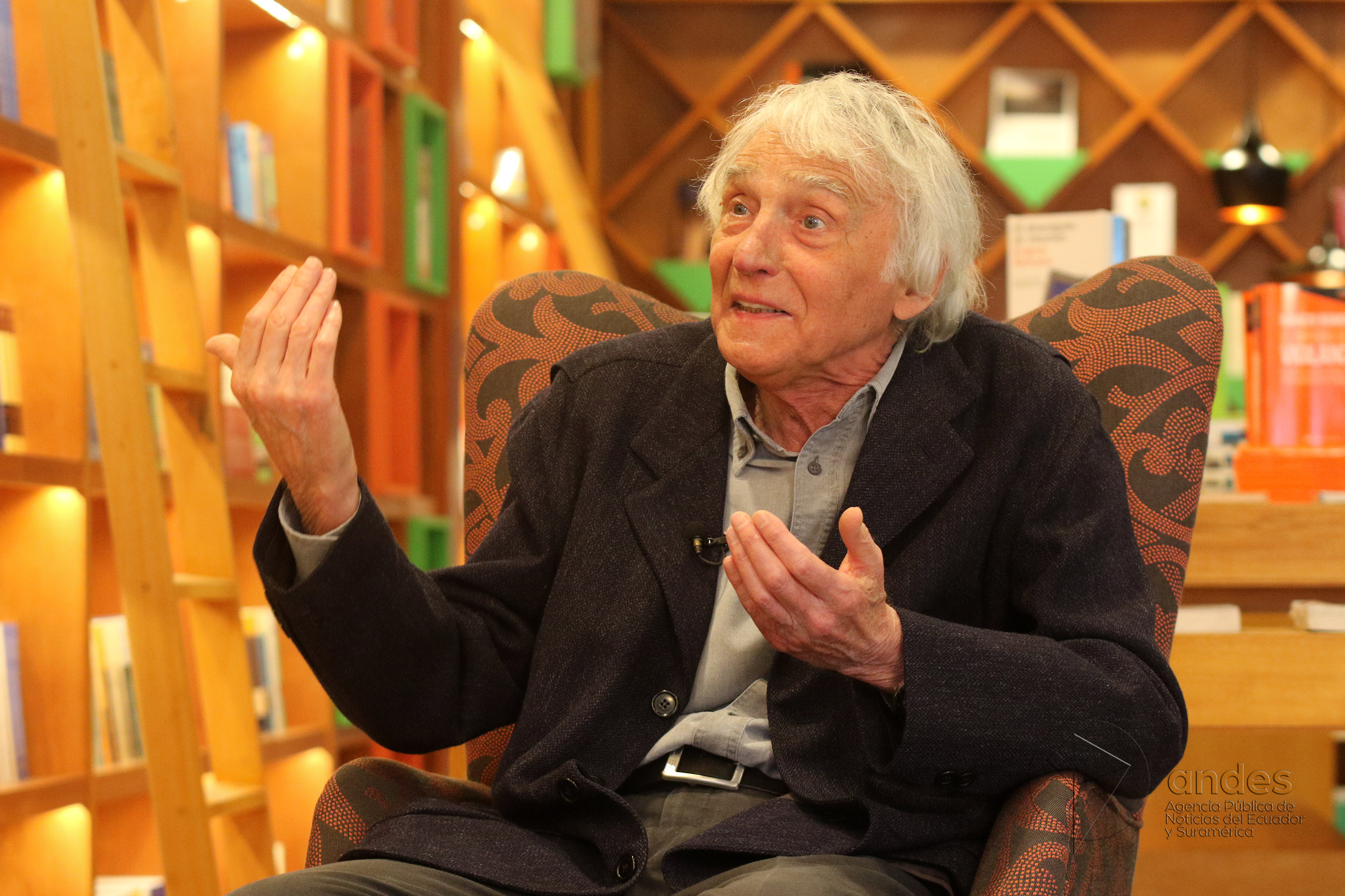 Quito, 16 Jun (Andes).- Entrevista otorgada por Armand Mattelart, famoso teórico de la comunicación, al programa Ecuador No Para, conducido por Marco Antonio Bravo. Francisco Sierra, presidente de CIESPAL también compartió la entrevista. Fotografías: Carlos Rodríguez/Andes.